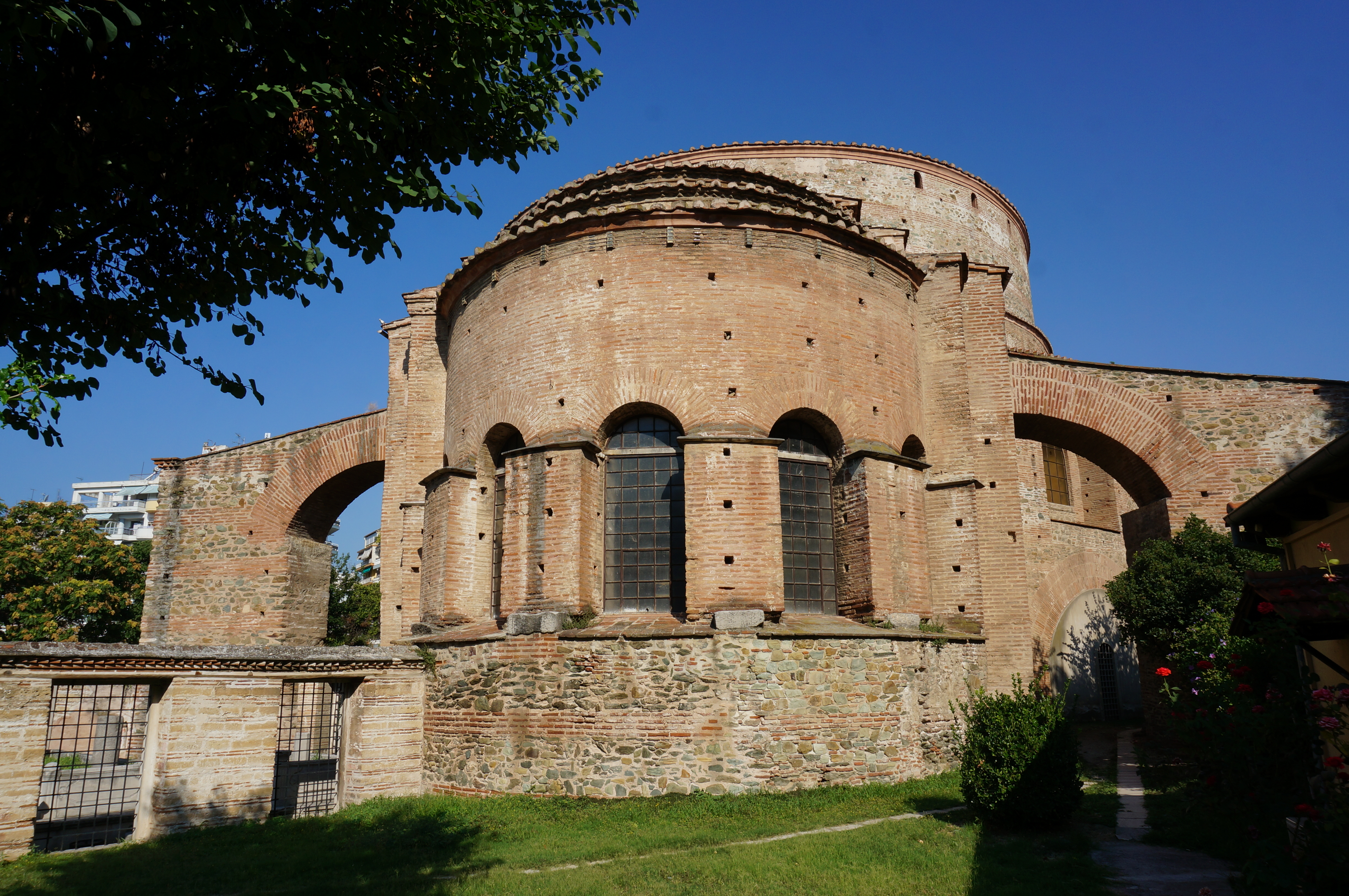 vue de la rotonde de st-georges.